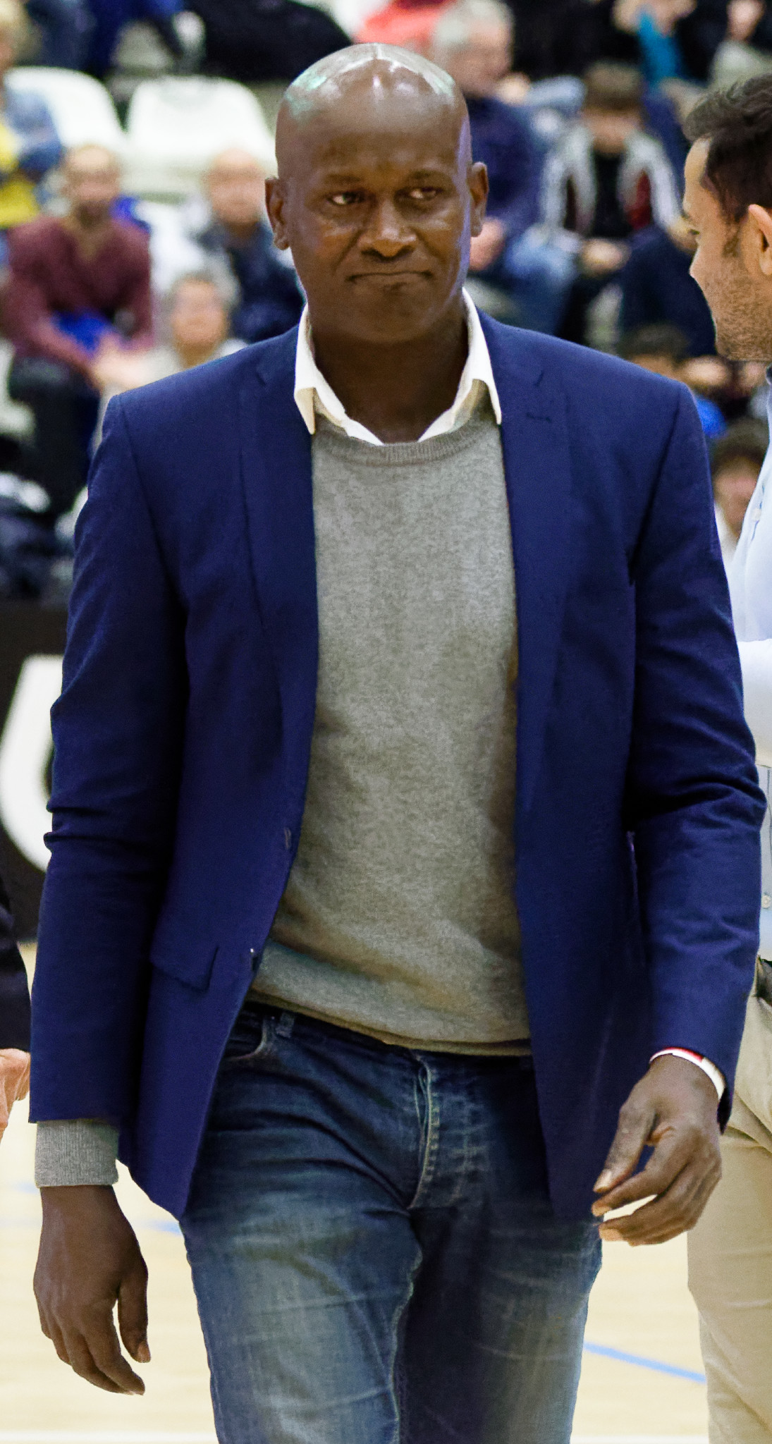 Olivier Girault, 20 octobre 2017